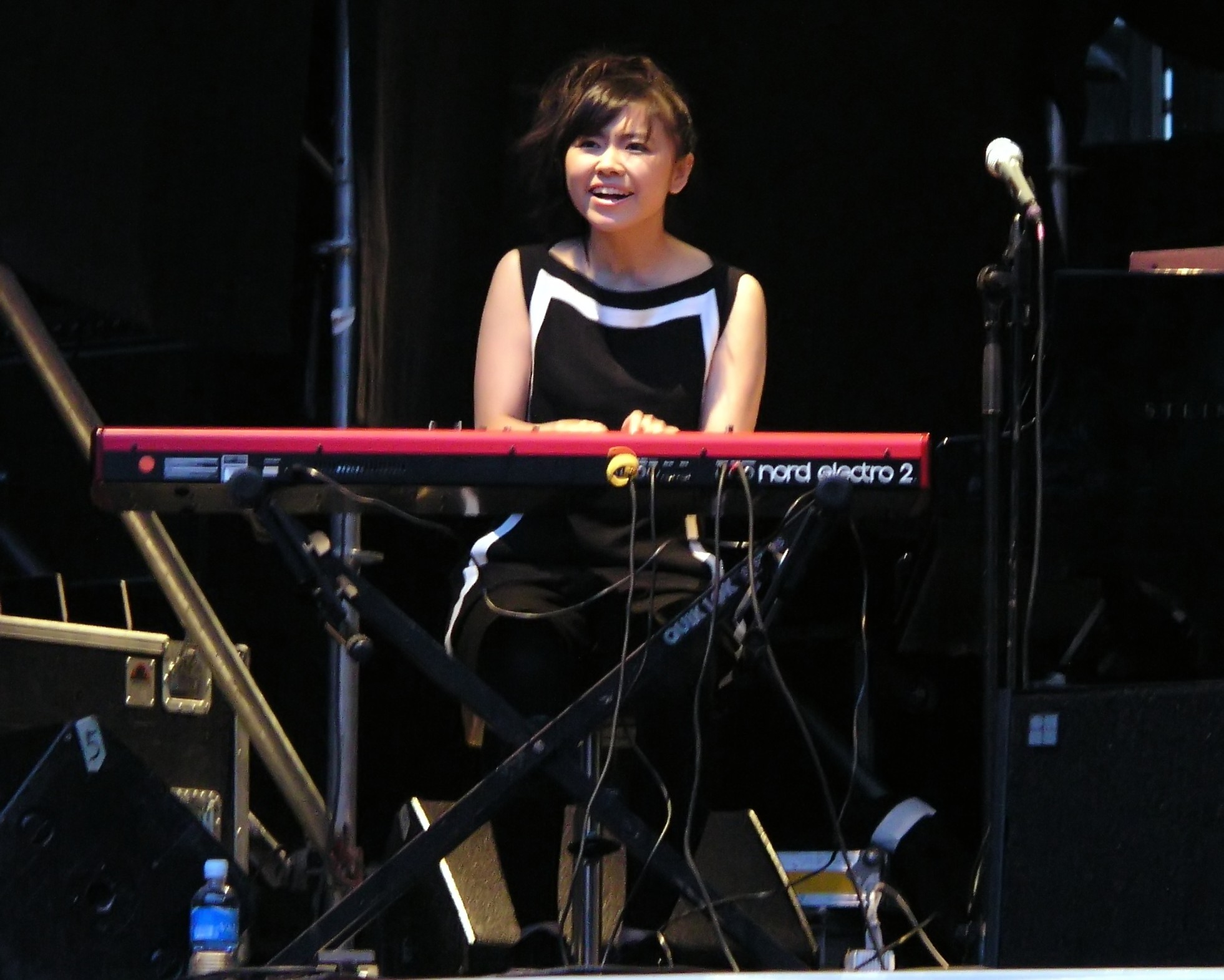 HiromiHiromi Uehara